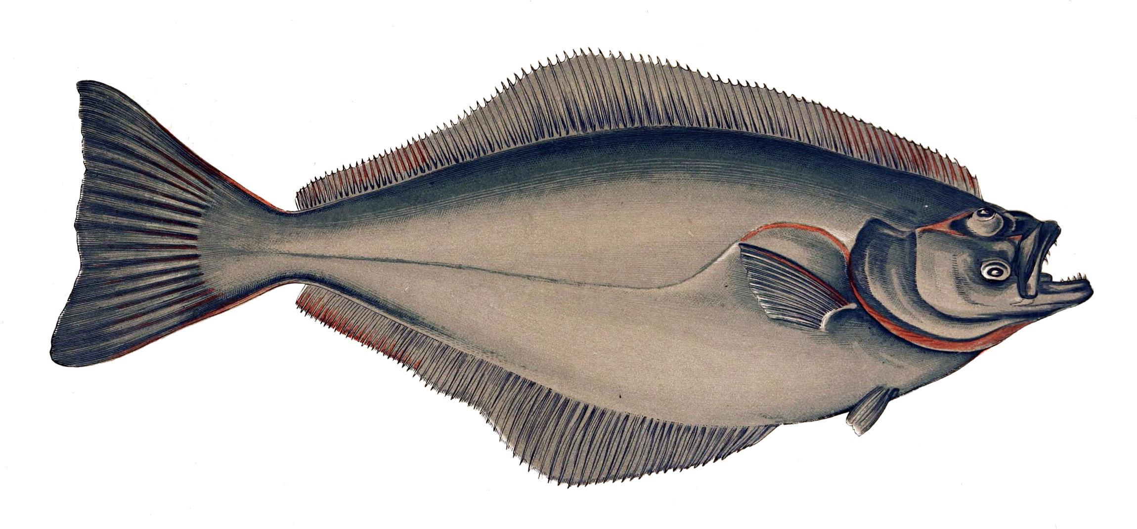 Hippoglossus hippoglossus